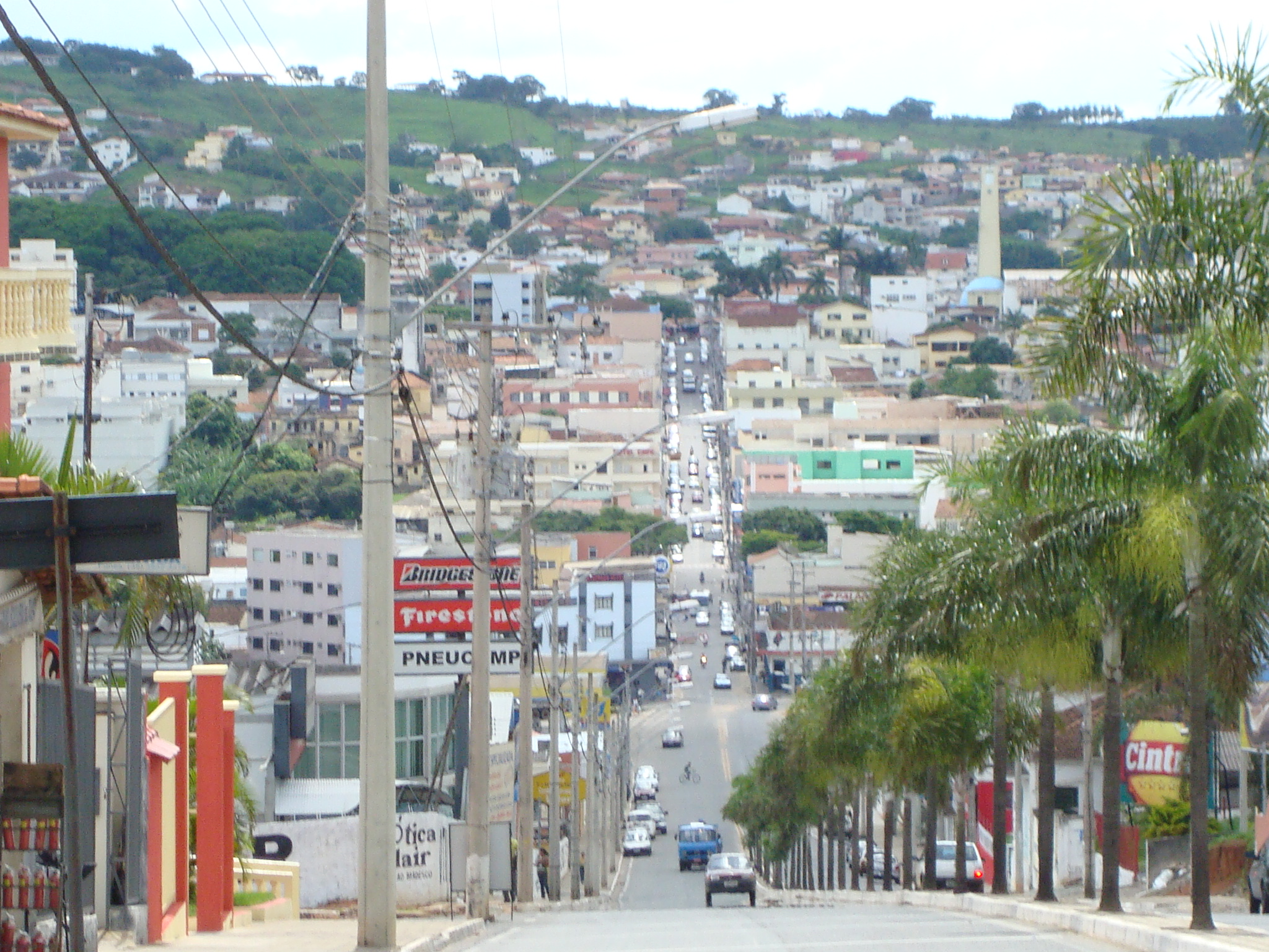 entrada da cidade através da Afonso Pena